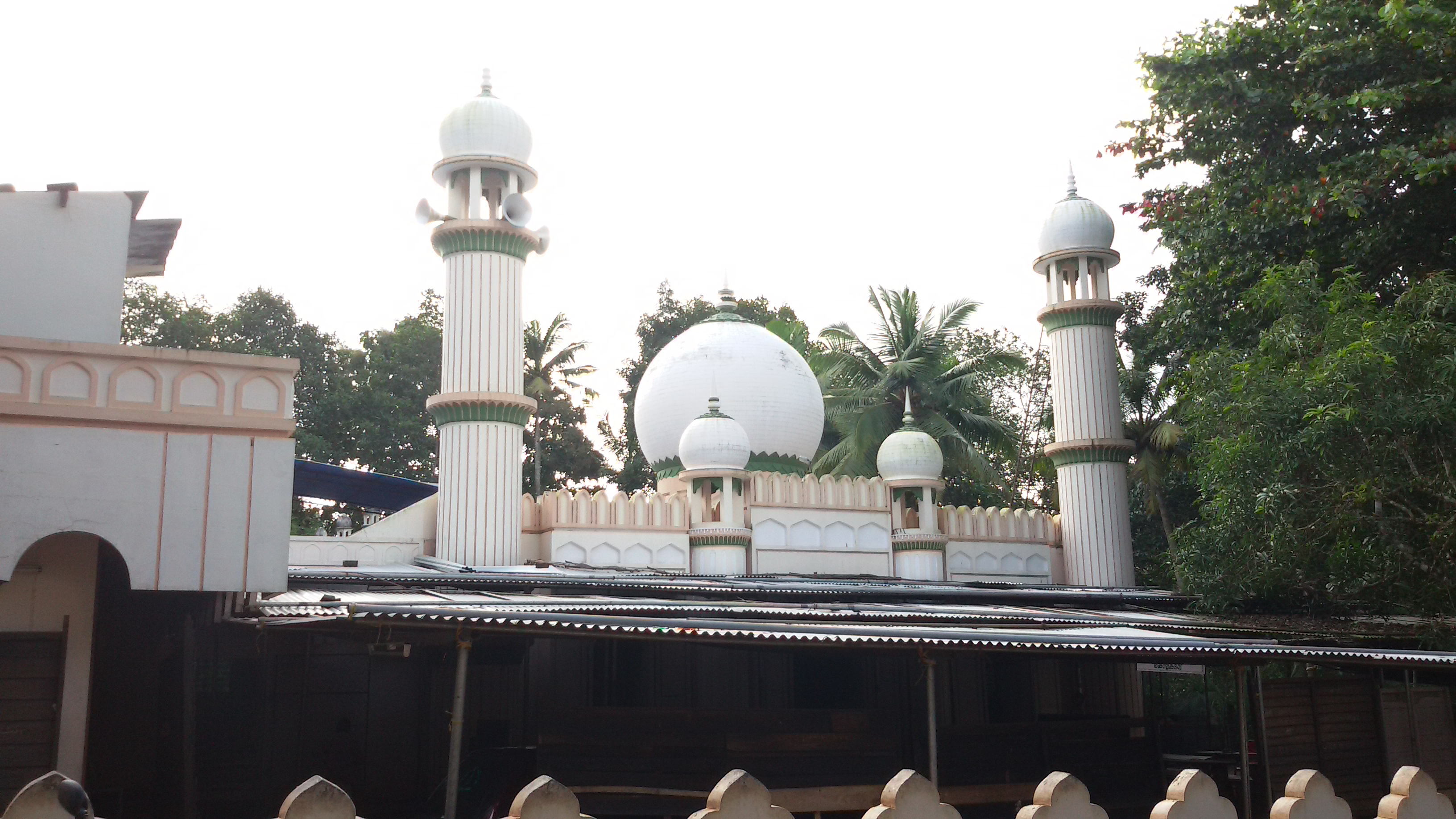 കൊല്ലകടവ് ജുമാമസ്ദിദ്